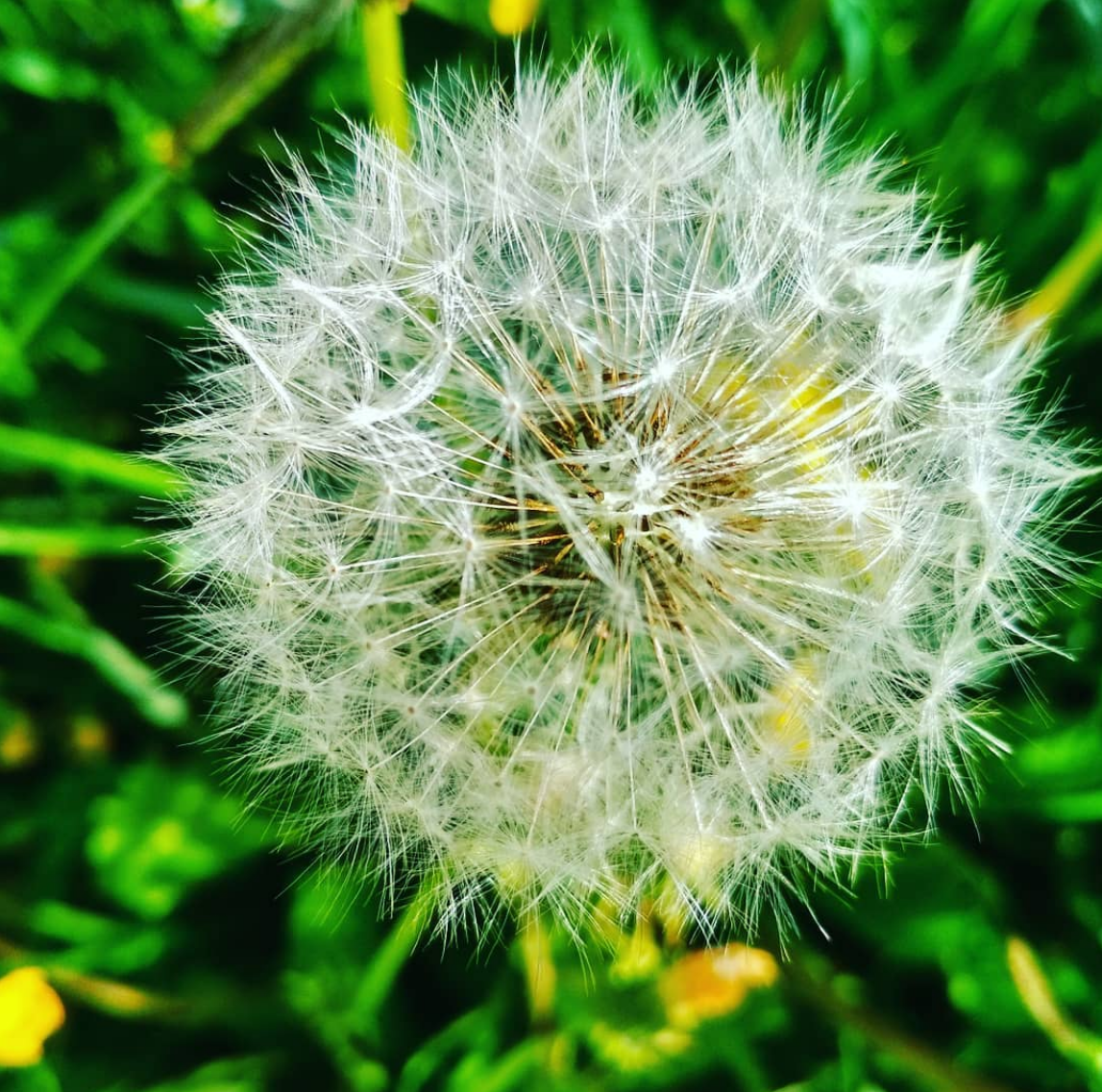 Blooming dandelion. Buryatia, Russia